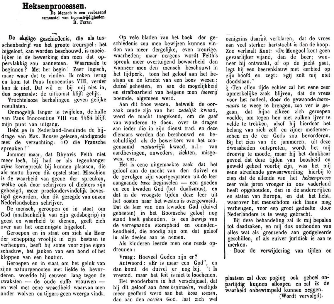 Heksenprocessen. Afkomstig uit De Volksvriend, jrg. 26, nr. 5 (2 februari 1884), [p. 3].